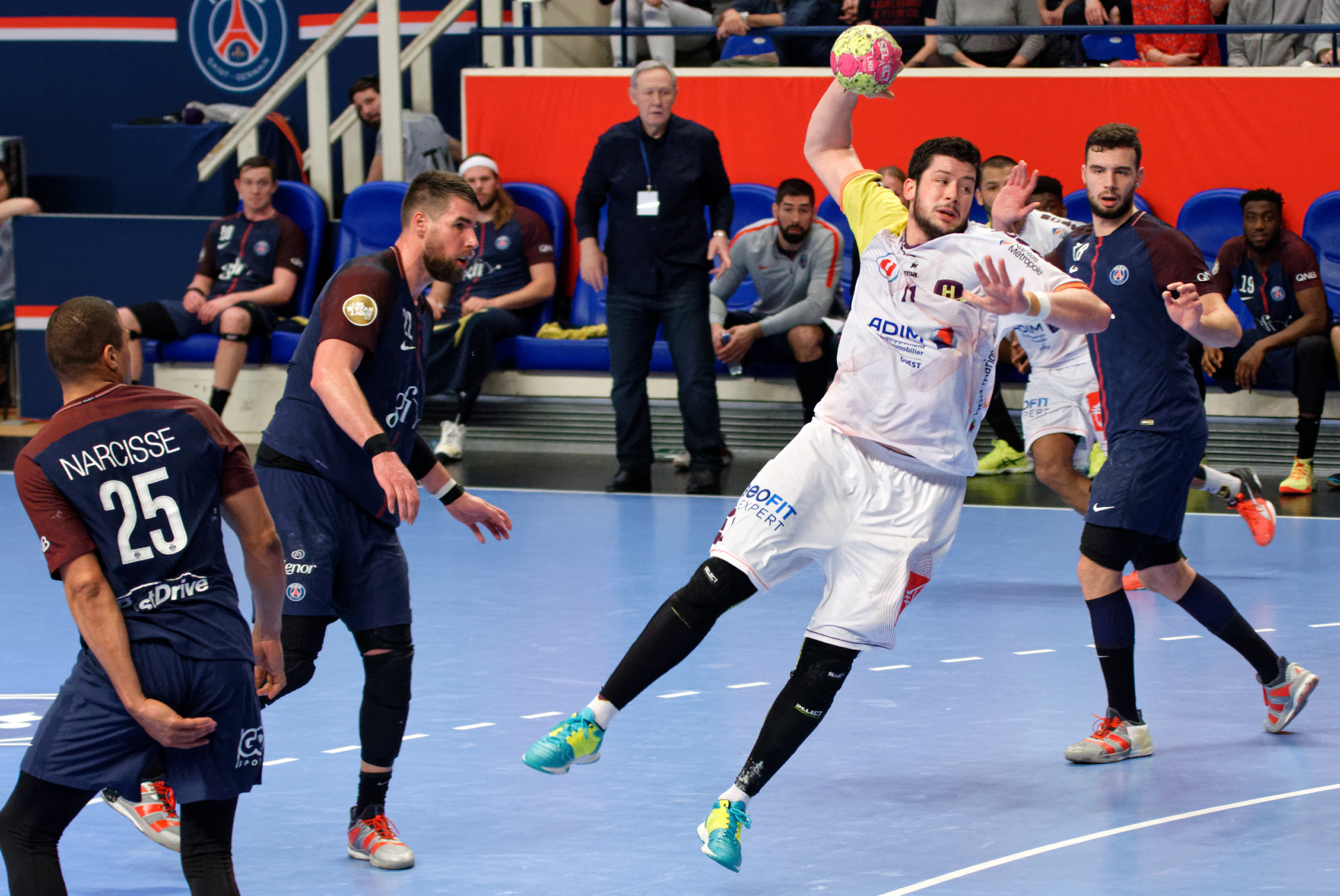 Rencontre de championnat entre le PSG et le HBC Nantes. A Coubertin, le 14 décembre 2018.